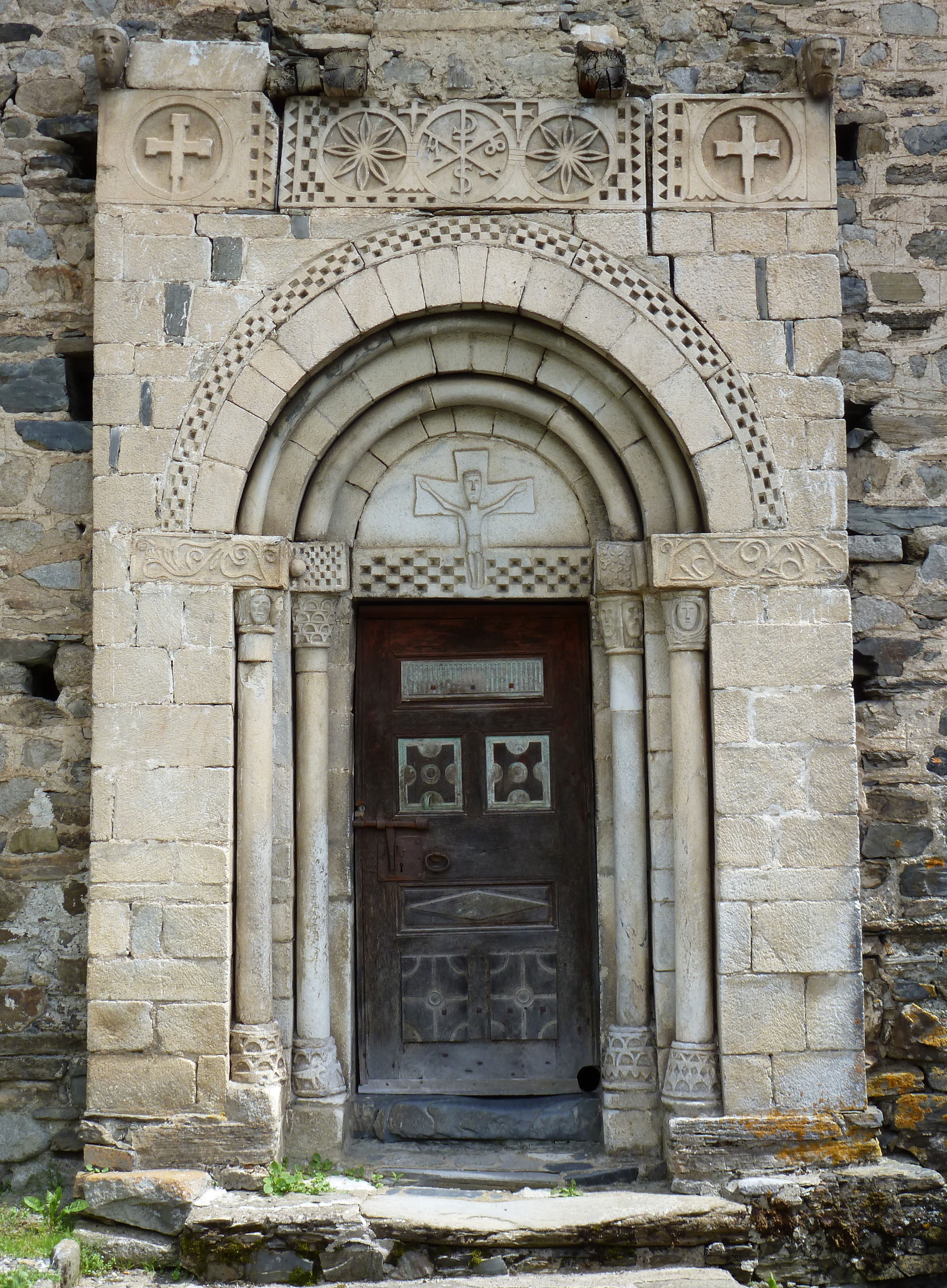 Portada romànica de Sant Andrèu d'Escunhau (Val d'Aran)